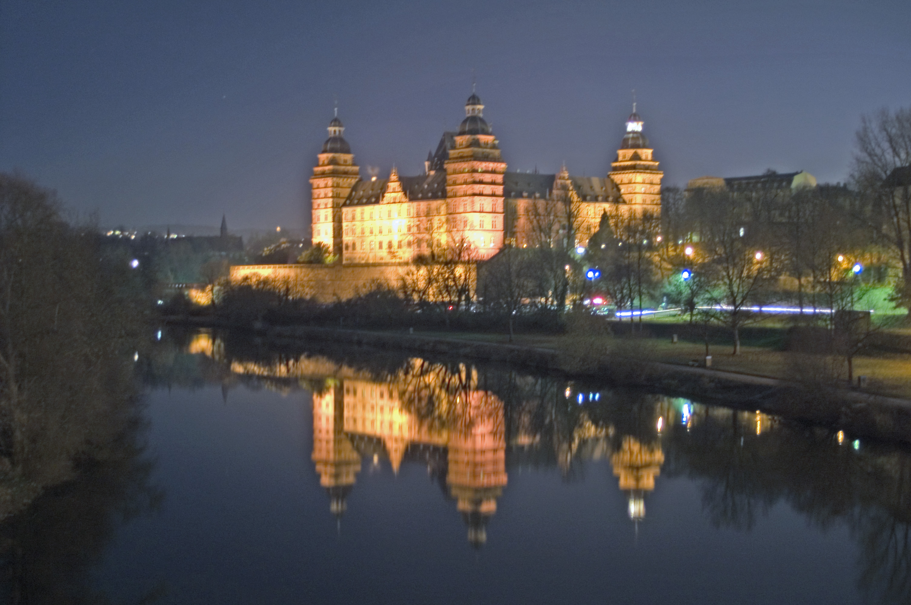 Schloss Johannisburg, Aschaffenburg, Bayern.